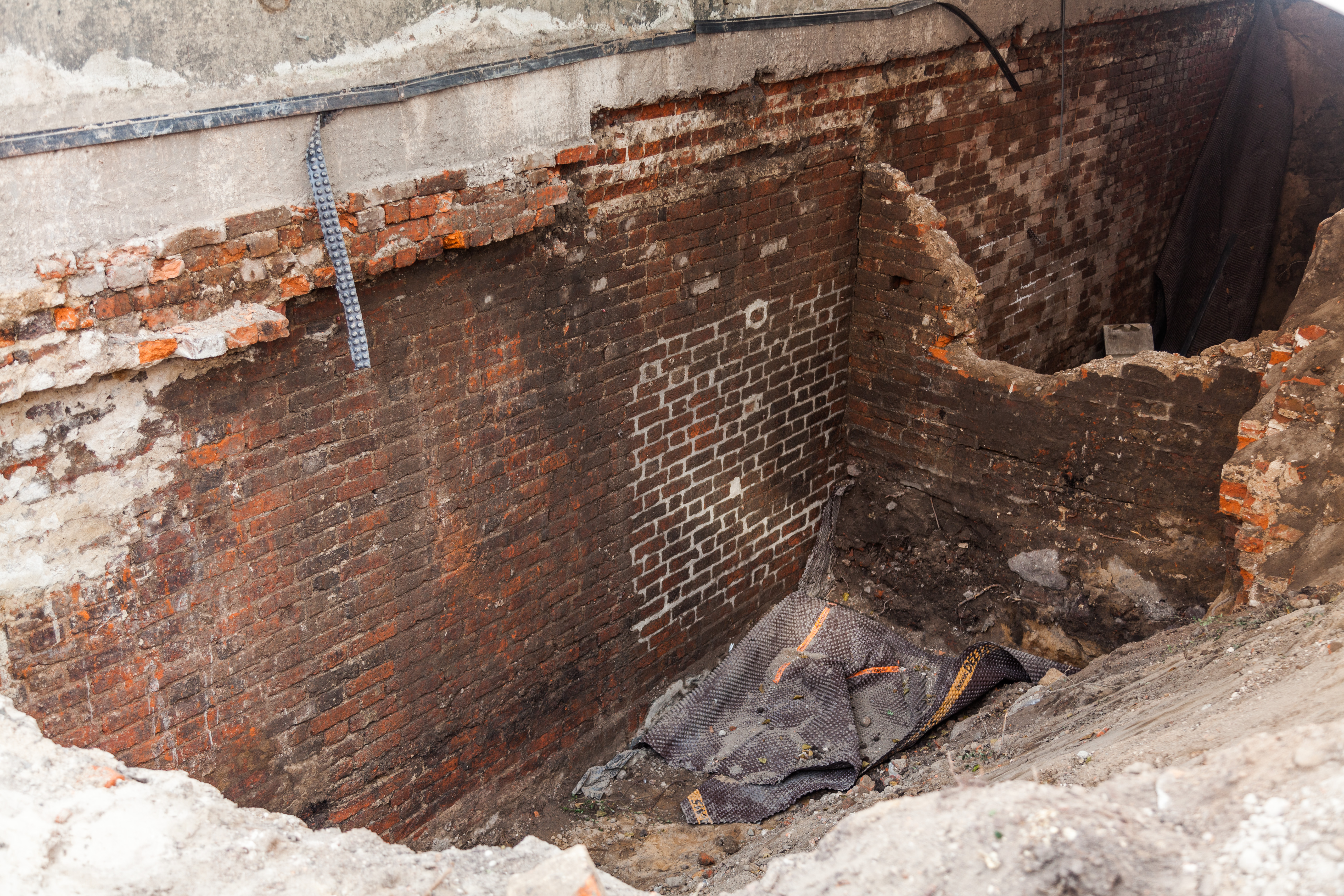 Relikty murów Ratusza Nowomiejskiego, odkryte w 2010 r. w trakcie konserwacji murów dawnego zboru ewangelickiego na Rynku Nowomiejskim w Toruniu.